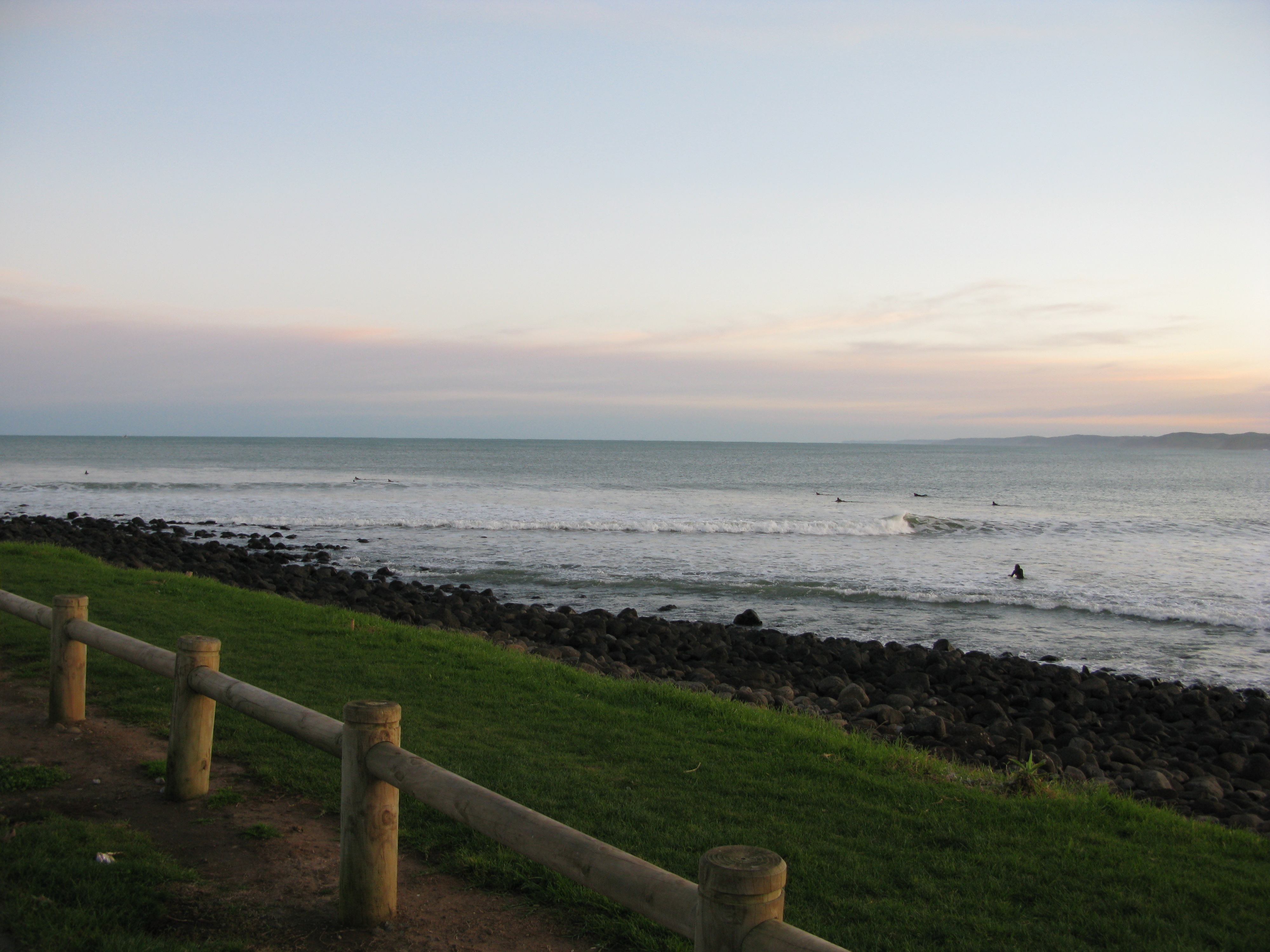 Manu Bay, à Raglan (Nouvelle-Zélande)